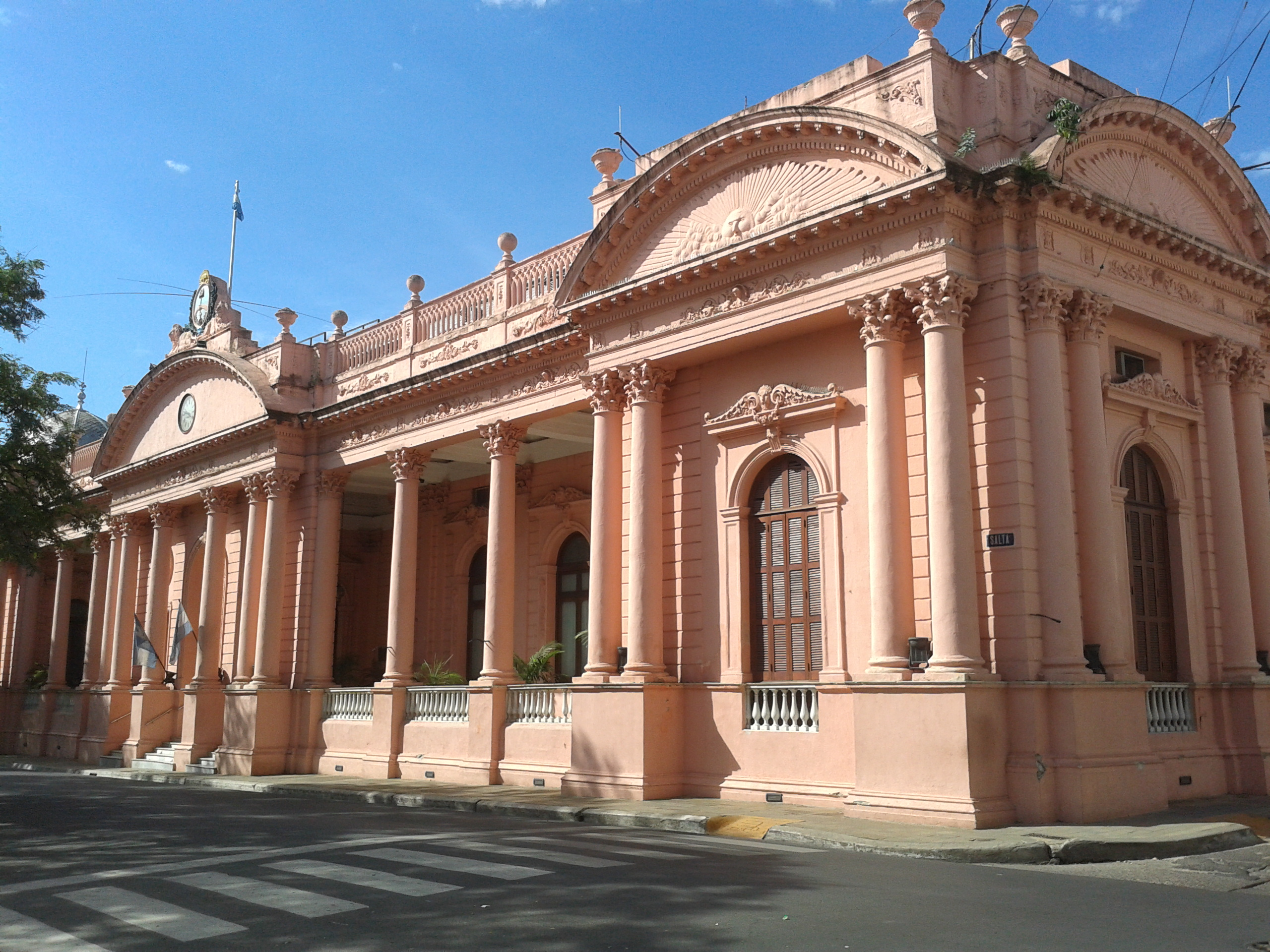 Intersección calles Salta y 25 de Mayo